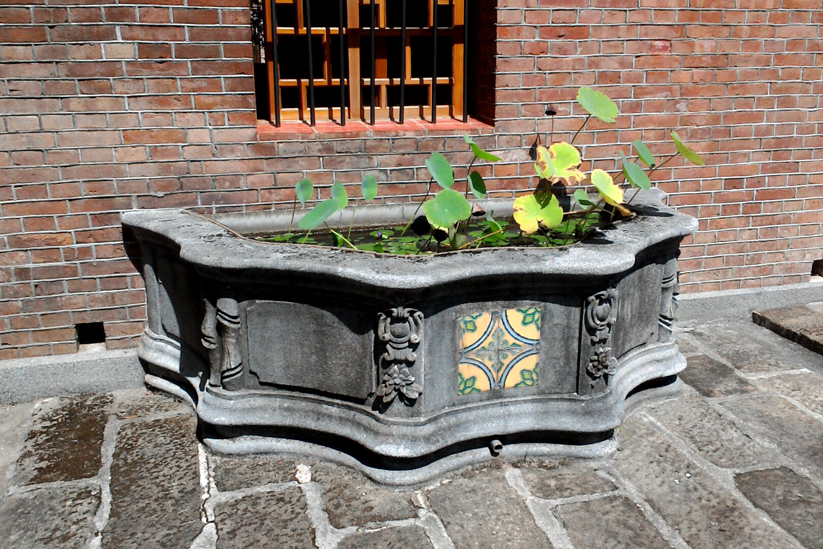 內湖郭氏古宅蓮花池,台北市內湖區紫陽次分區紫陽里